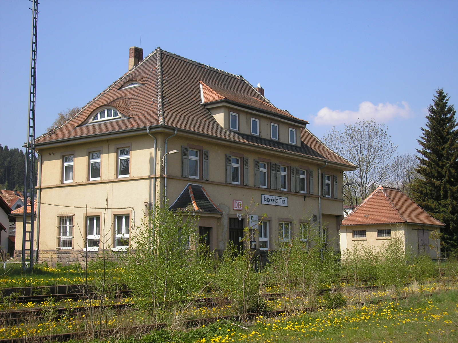 Der Bahnhof in Langewiesen bei Ilmenau (Thüringen). Erbaut: 30er-Jahre, stillgelegt 1998.